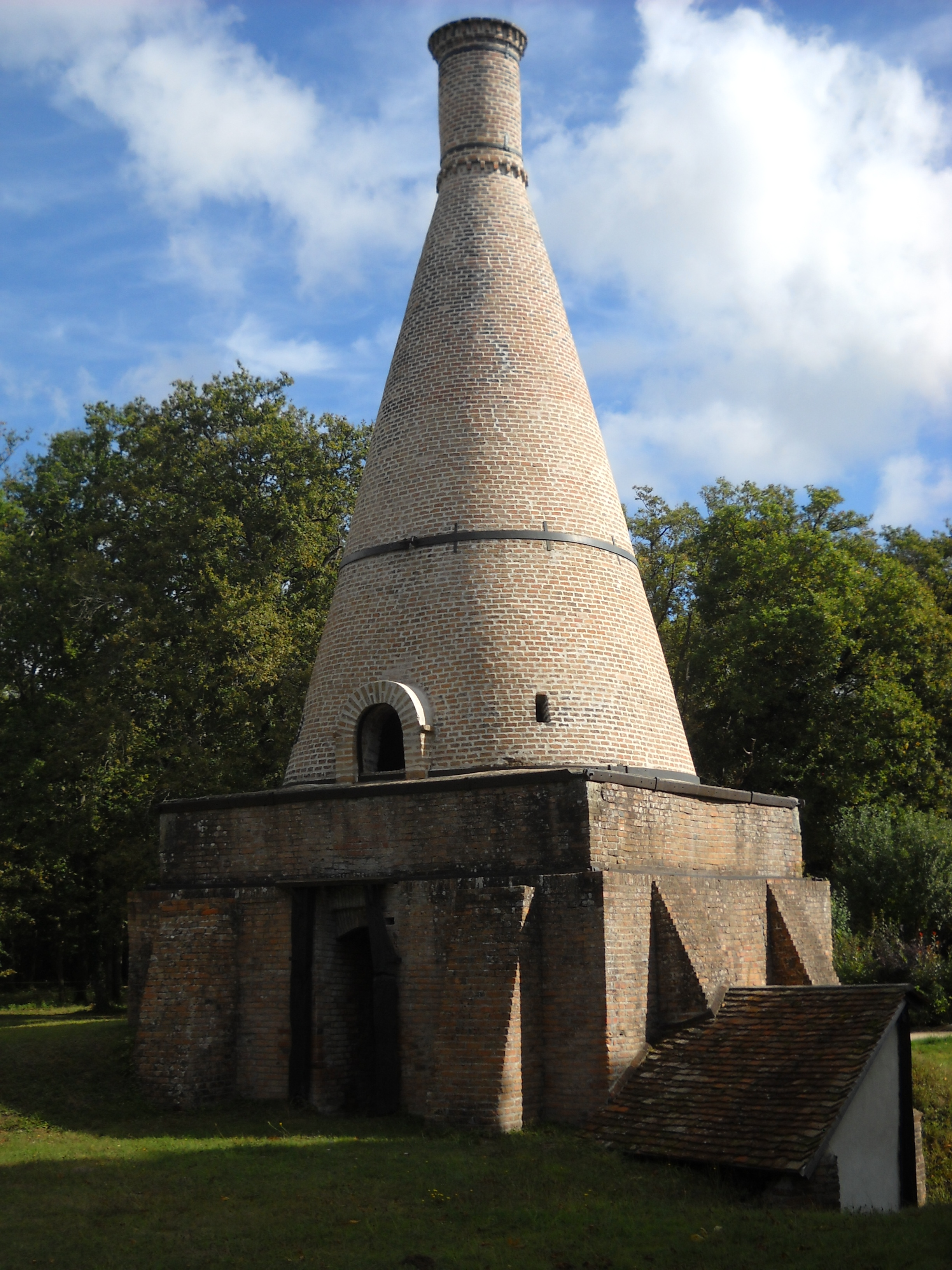 Magnifiquement entretenue et mise en valeur. .